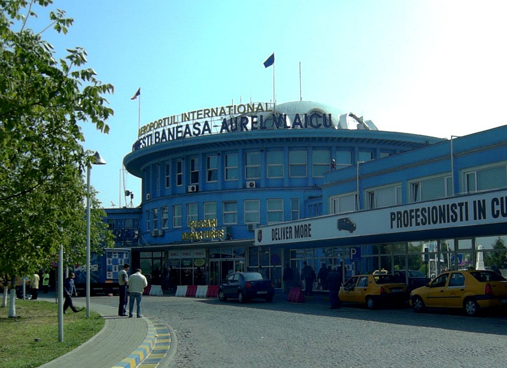 Baneasa, der kleinere Flughafen von Bukarest (Rumänien)